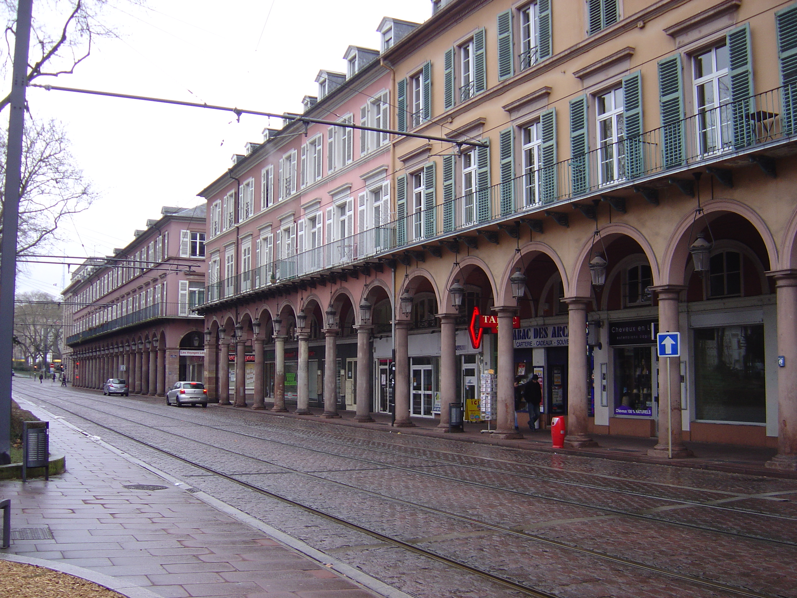 Arcades de l'avenue du Maréchal Foch, Mulhouse.